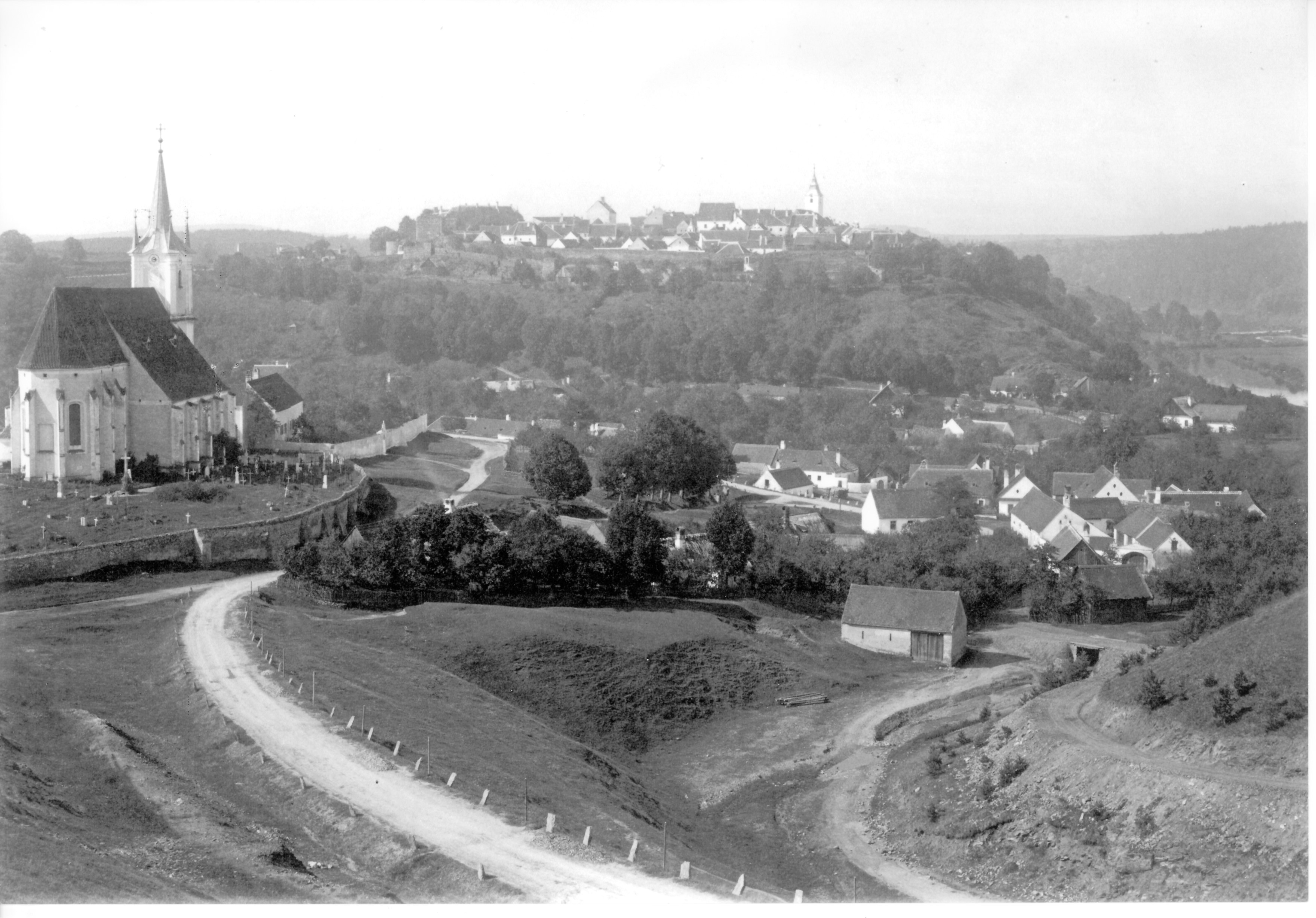 Blick auf Drosendorf-Stadt von der Straße nach Heinrichsreith (Drosendorf-Altsadt) aus. Im Vordergrund links ist die Pfarrkirche Peter und Paul ("Altstadt-Kirche") zu sehen. Enstanden vermutlich um 1860 als eine der ersten Fotografien von Drosendorf.